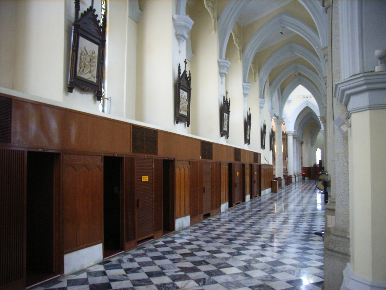 聖母無原罪主教座堂是天主教香港教區的主教座堂，位於香港中環zh:堅道，於1888年落成。